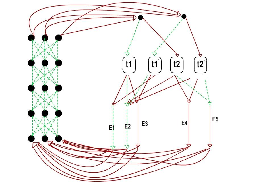 Paso 3.